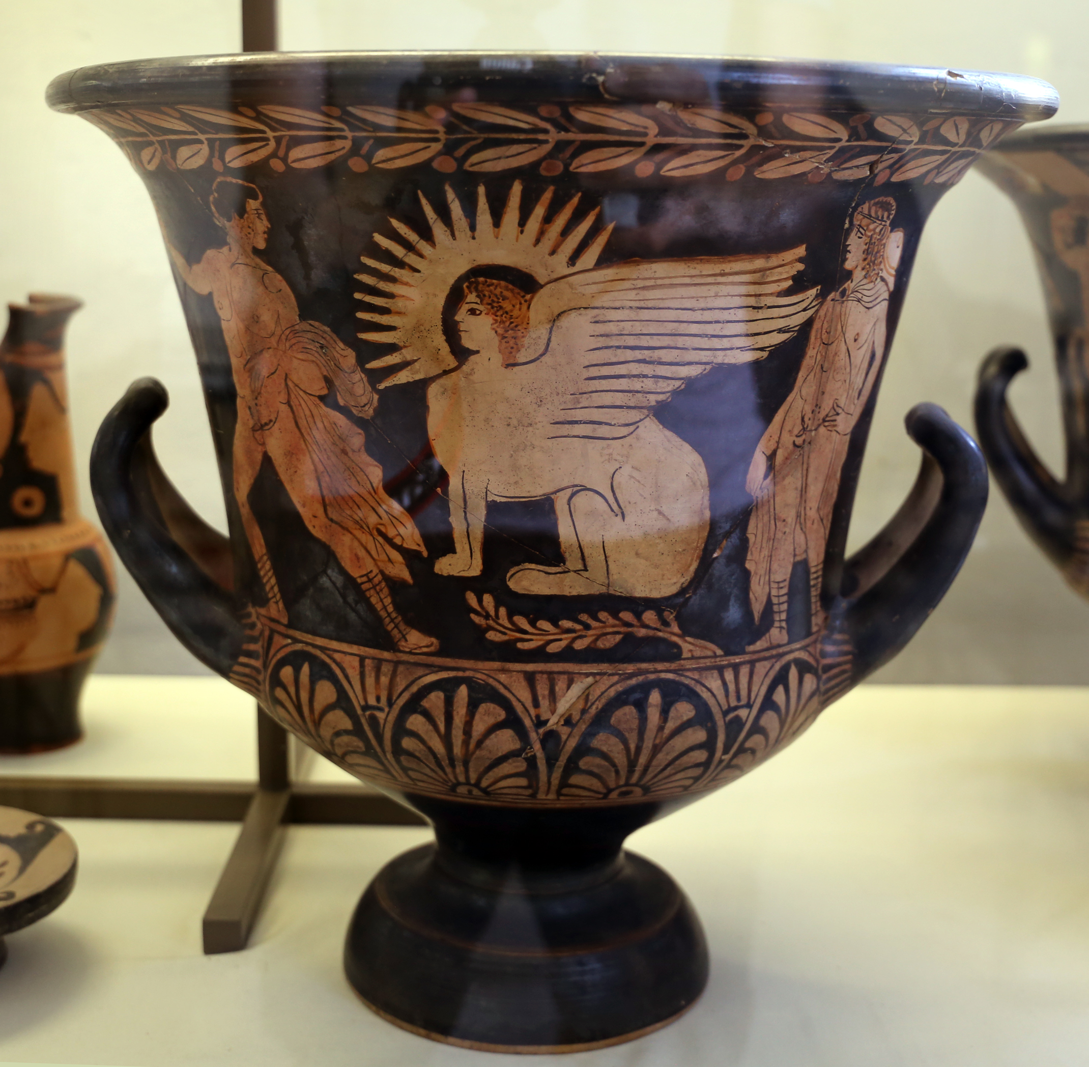 Collections of the Museo archeologico nazionale (Parma) This is a photo of a monument which is part of cultural heritage of Italy.